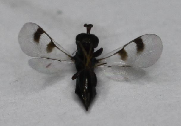 Ventralansicht der Erzwespe Cheiropachus quadum